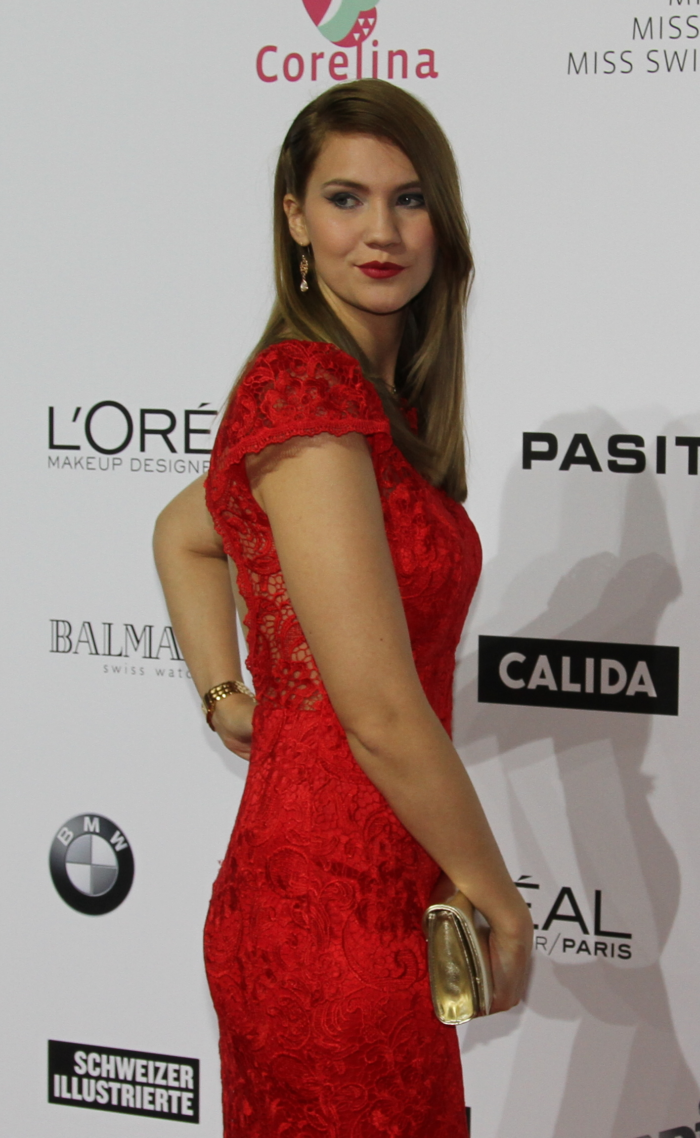 Miss Schweiz 2010 Kerstin Cook an der Miss Schweiz 2015 Wahl